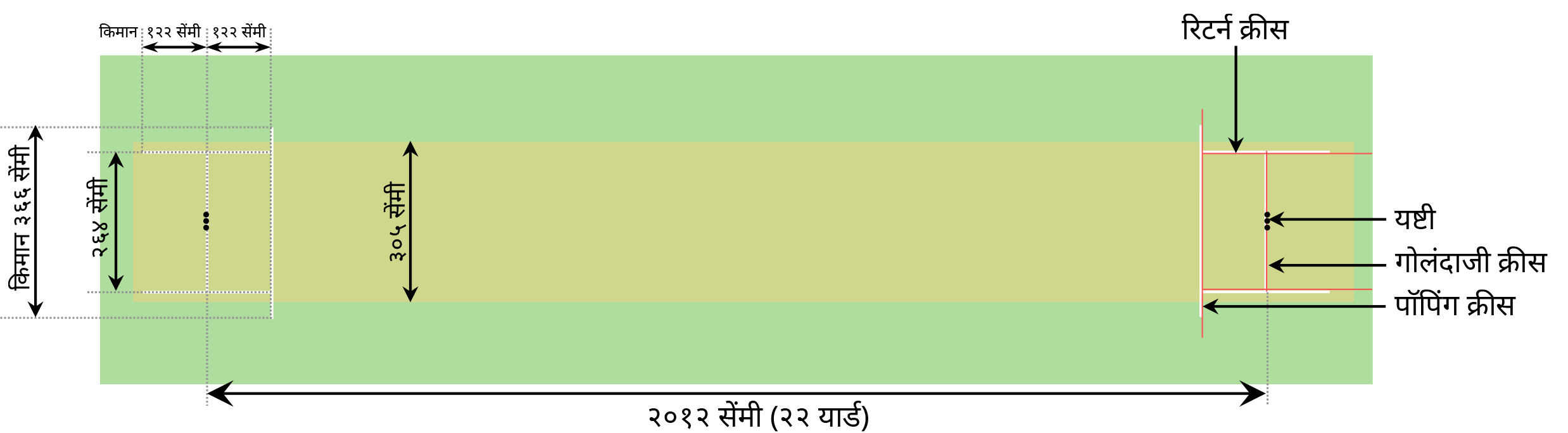 क्रिकेट मैदानावरील खेळपट्टी, जेथे प्रामुख्याने क्रिकेट खेळले जाते